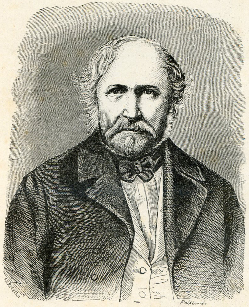 Беларуская (тарашкевіца): Партрэт Тэадора Нарбута (Teador Narbut)